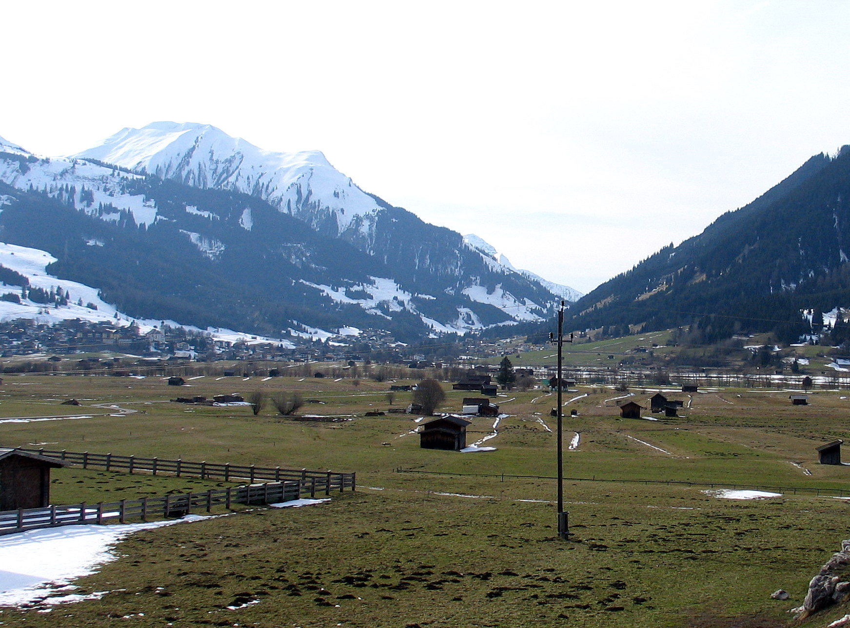 Lermooser Moos, vlakte tussen Ehrwald, Biberwier en Ehrwald, gezien vanaf Ehrwald met links Lermoos